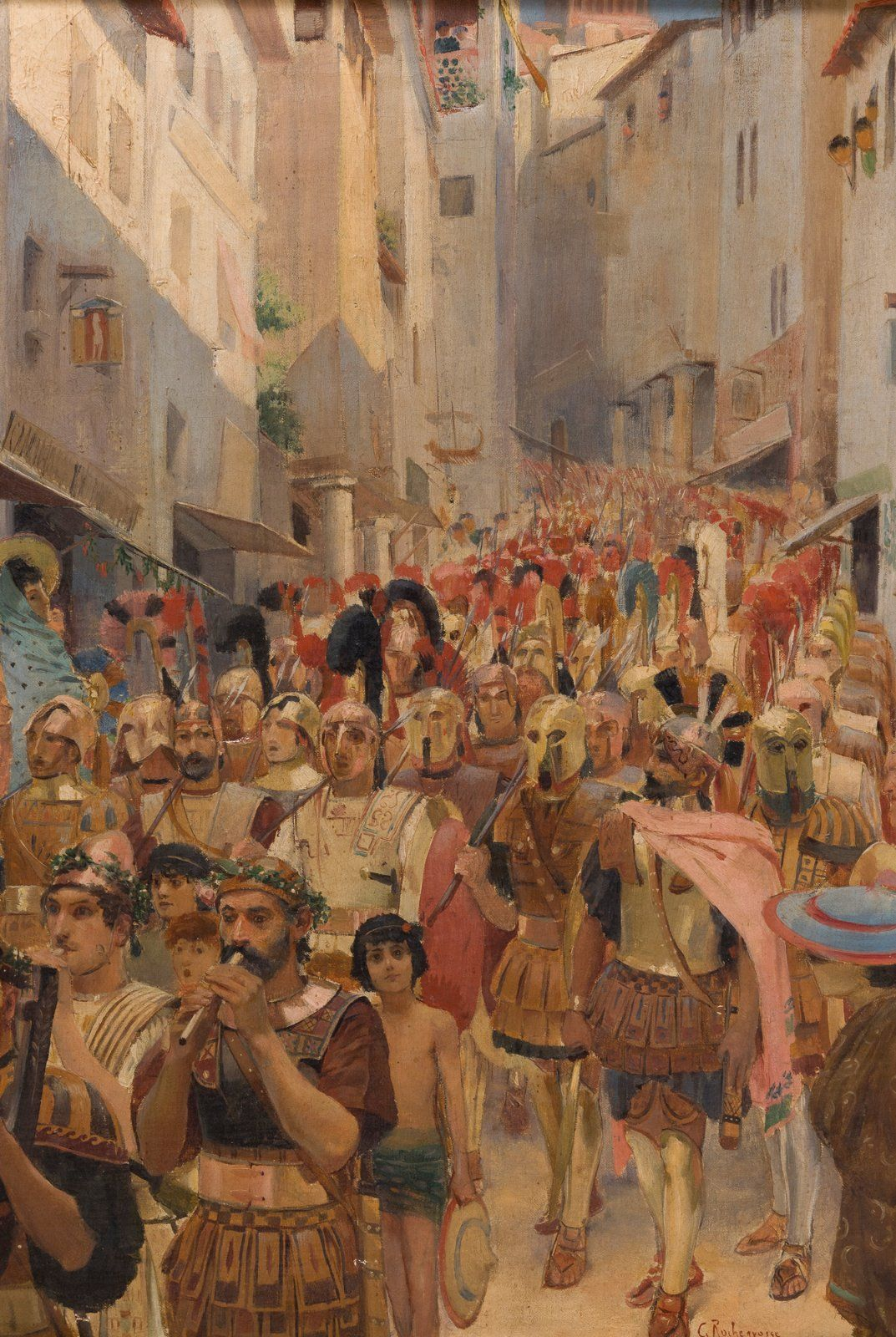 Huile sur toile signée en bas à droite.